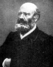 Jean Jacques Pillot (1808-1877)